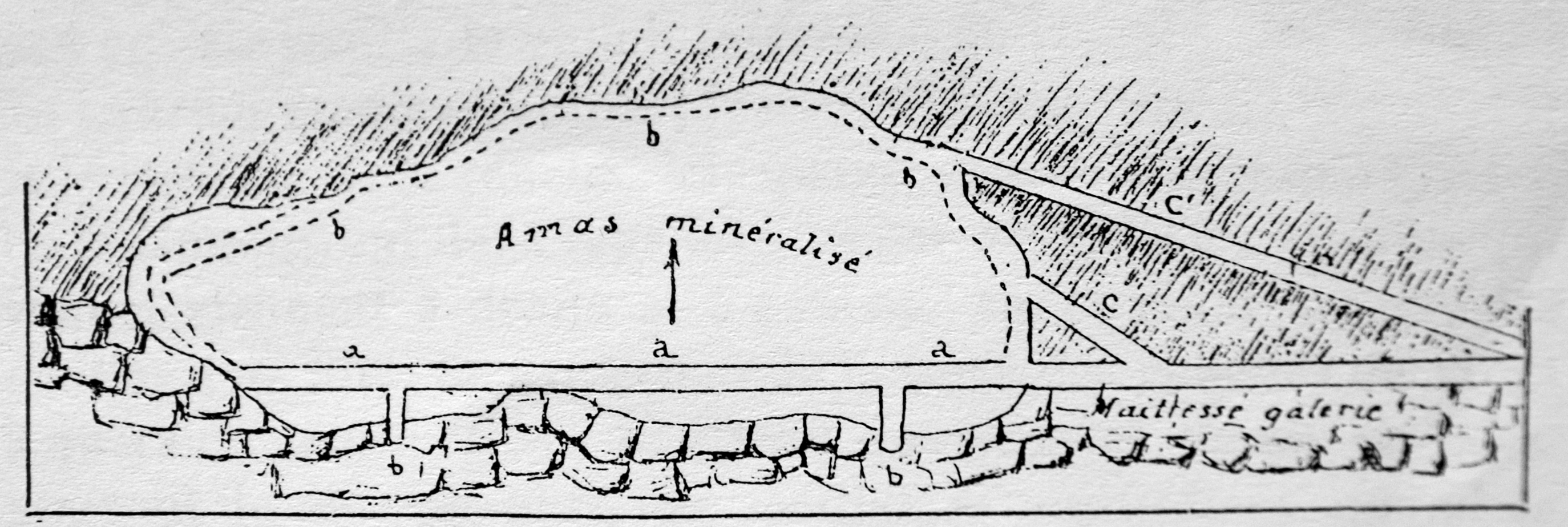 Schéma d'un amas de minerai de galène argentifère et de la stratégie d'exploitation de celui-ci ; photographie d'une illustration de l'ouvrage libre de droit Édouard Ardaillon Les mines du Laurion dans l'Antiquité, Fontemoing, Paris, 1897, p. 45